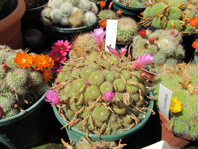 Rebutia perplexa